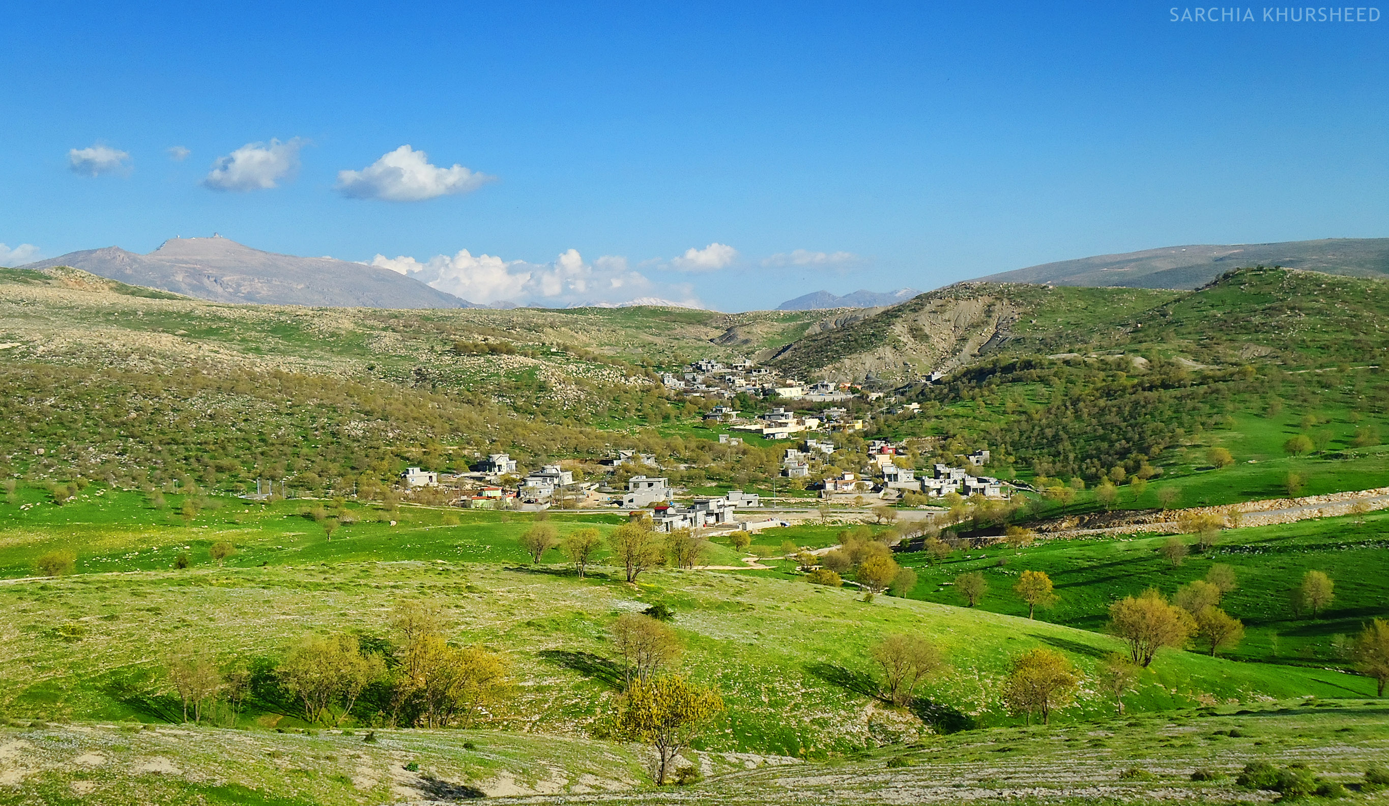 کوردیی ناوەندی: دیمەنێکی گوندی بەنۆکە، لە لە وەرزی بەھاردا